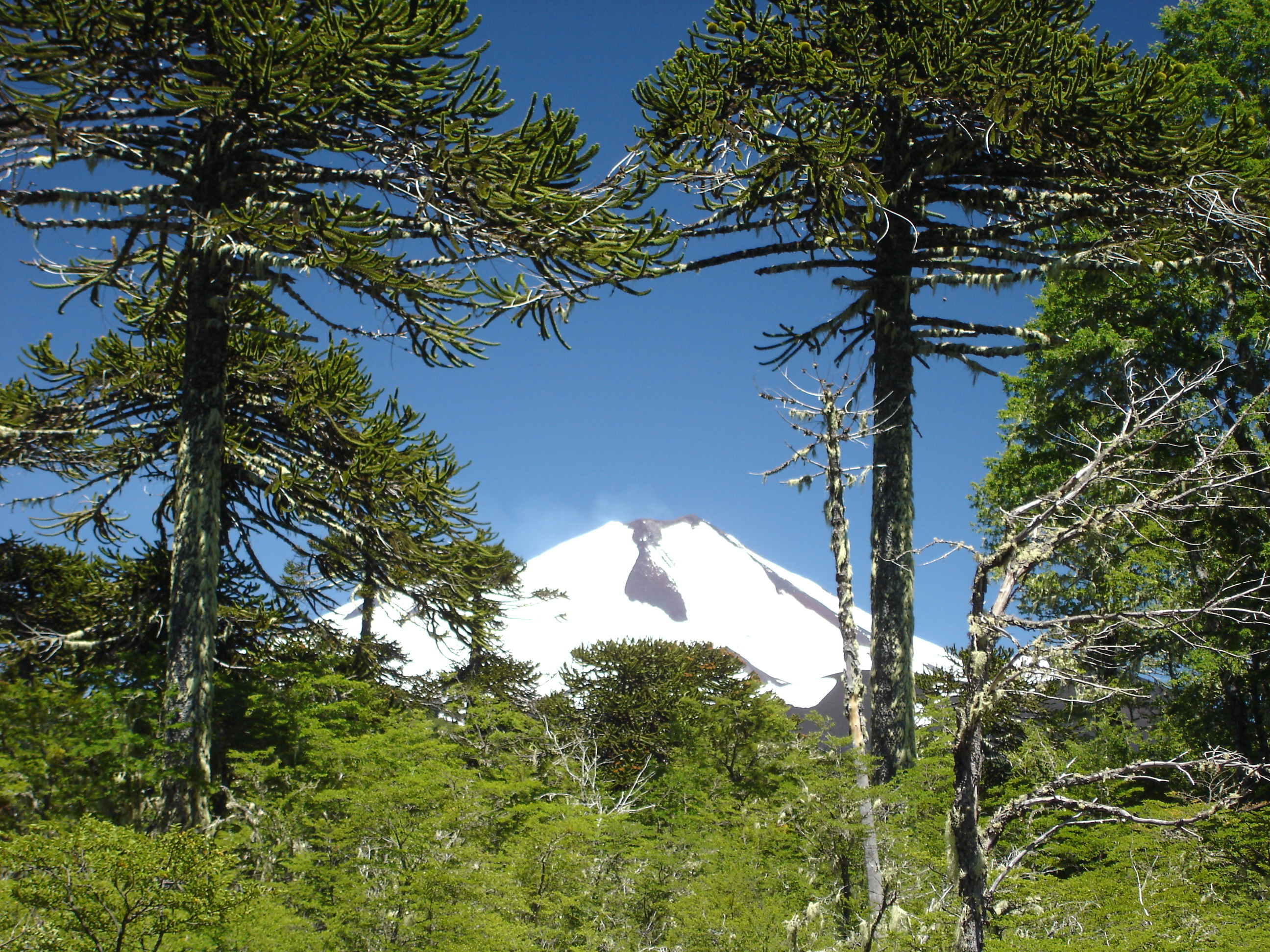 Volcan Llaima, Parque Nacional Conguillío, Chile